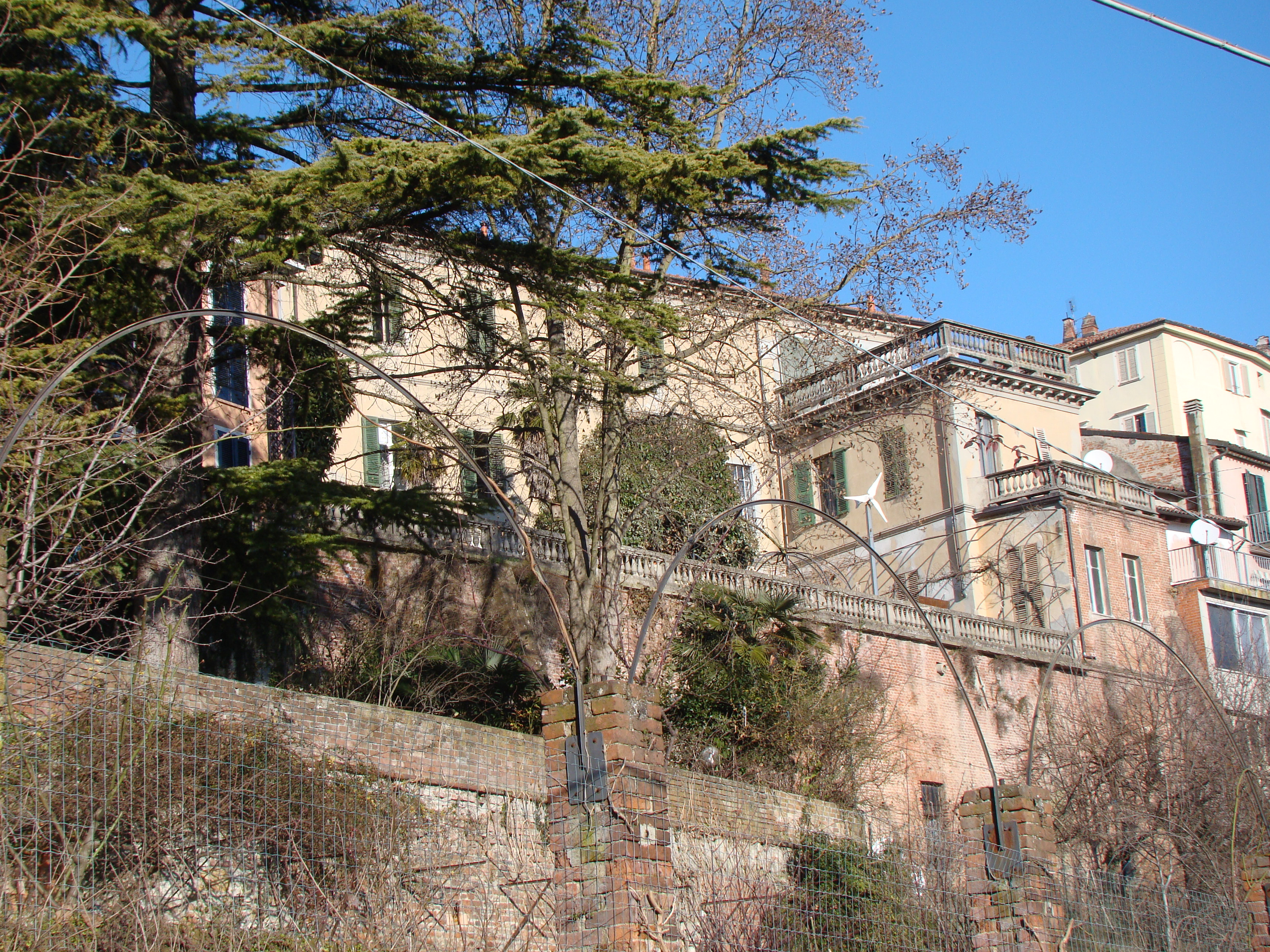 palazzo squassi